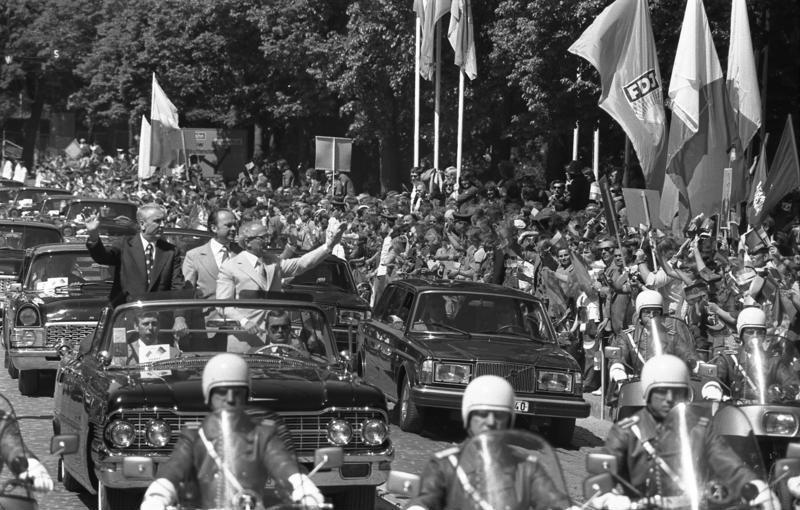 Frankfurt/Oder, Edward Gierek, Erich Honecker ADN-ZB / Koard / 29.5.77 / Frankfurt/Oder: Besuch Erich Honecker und Edward Gierek trafen am Vormittag des 29.5. zu einem Besuch in der Stadt an der Oder ein. Bei der Fahrt durch die Stadt in offenem Wagen wurden sie von der Bevölkerung und Teilnehmern des Treffens der Freundschaft herzlich willkommen geheißen. [Frankfurt a.d. Oder.- Edward Gierek (links) und Erich Honecker in ZIL-111 Cabriolet(Lichatschow-Werk/ Sawod imeni Lichatschowa) stehend, winkend, begleitet von Volvo 264 TE (?)] Abgebildete Personen: Honecker, Erich: Staatsratsvorsitzender, Generalsekretär des ZK der SED, DDR (GND 118553399) Gierek, Edward: 1. Sekretär des ZK der Vereinigten Arbeiterpartei (KP), Polen (GND 118694715)